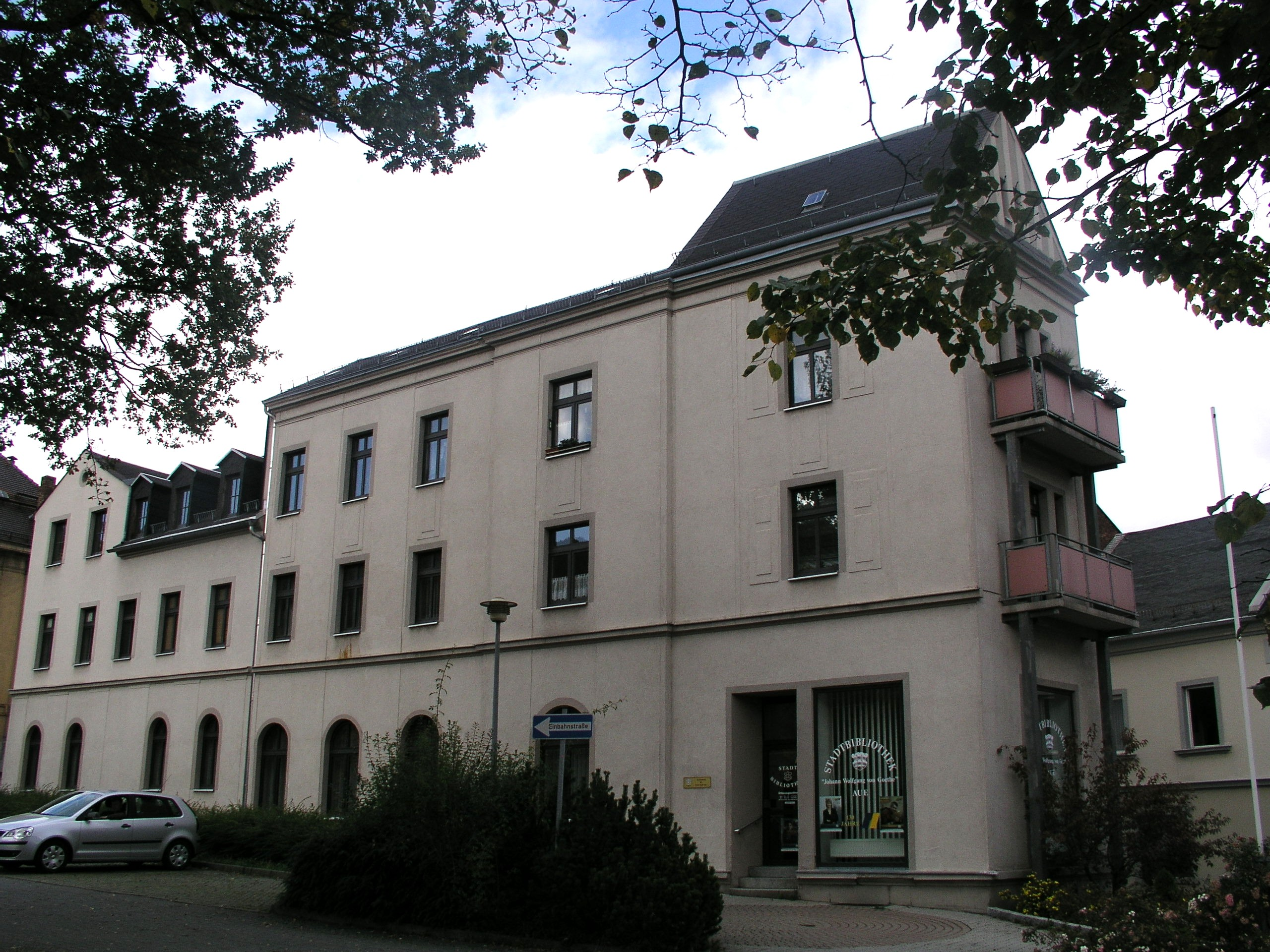 Stadtbibliothek, früher „Café Georgi“